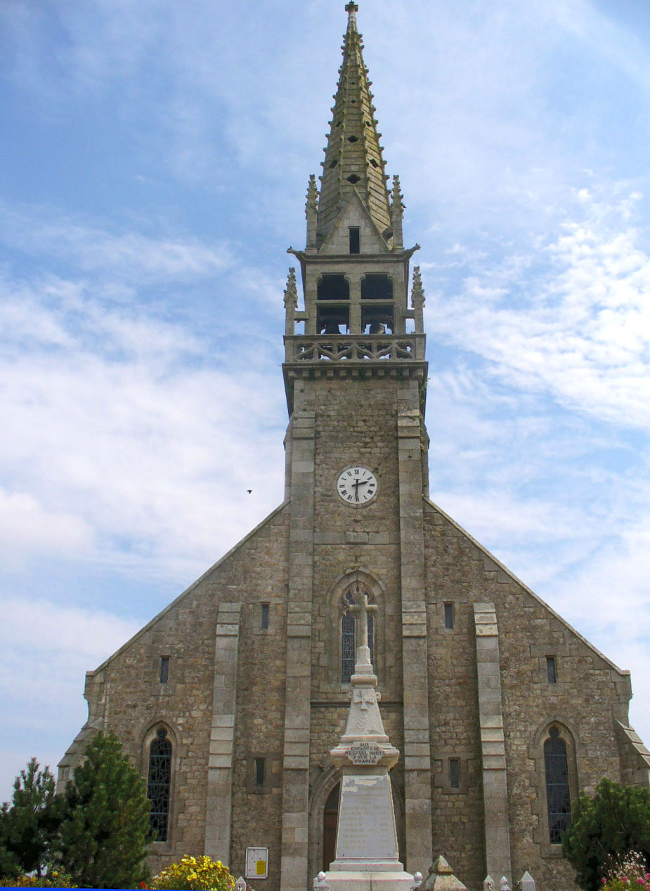 Eglise de Mespaul